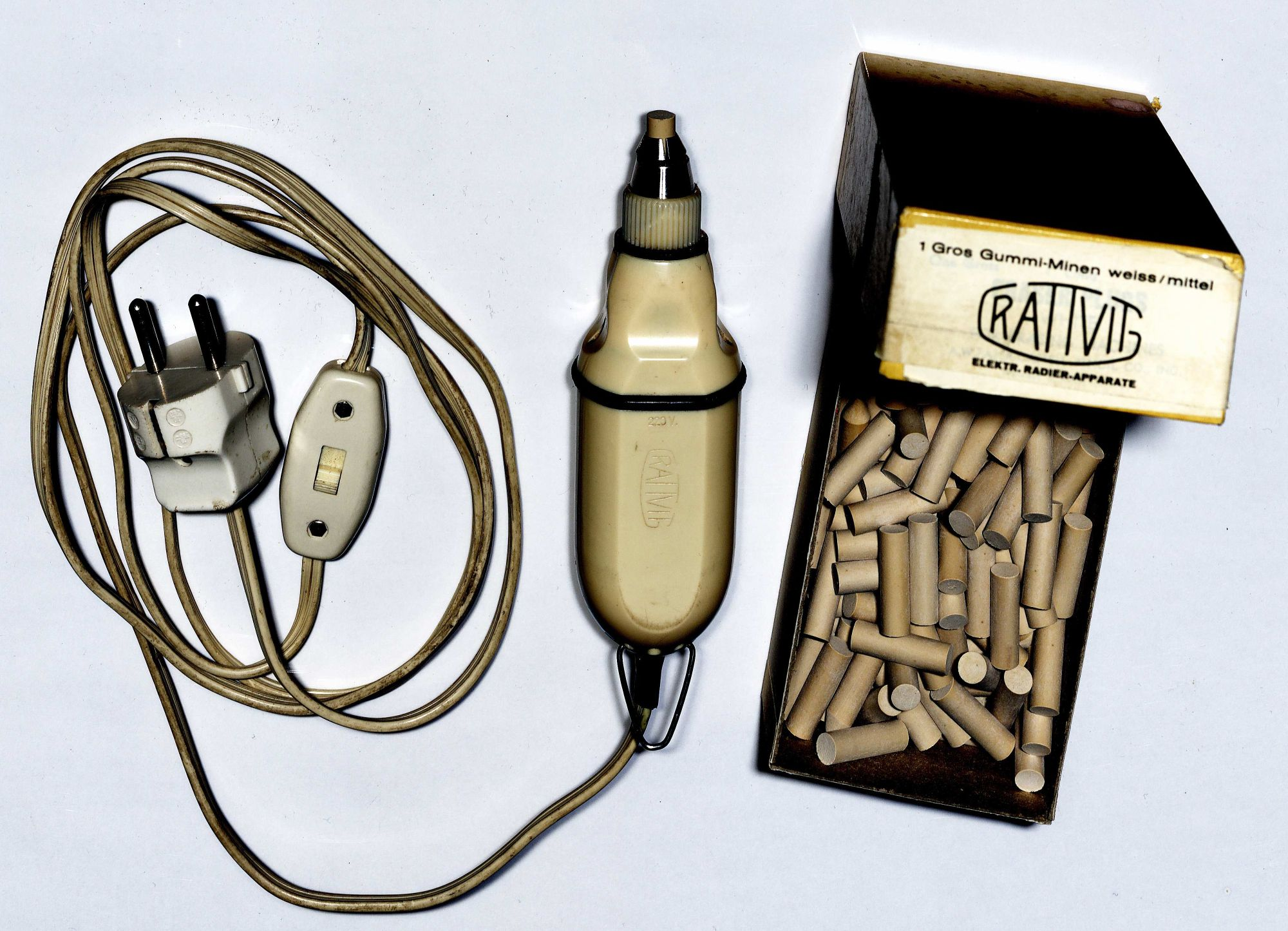 Elektrischer Radierapparat Rattvit mit rotierendem Kopf, Radiergummi in Halterung eingesteckt, Kiste mit Ersatzradiergummis, vermutlich aus den 1960er Jahren